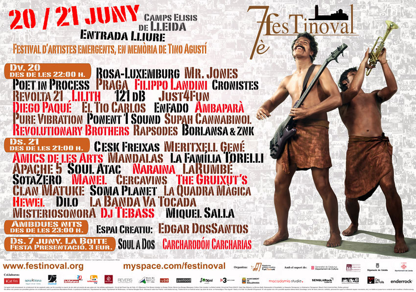 Cartell Festinoval de l'any 2008